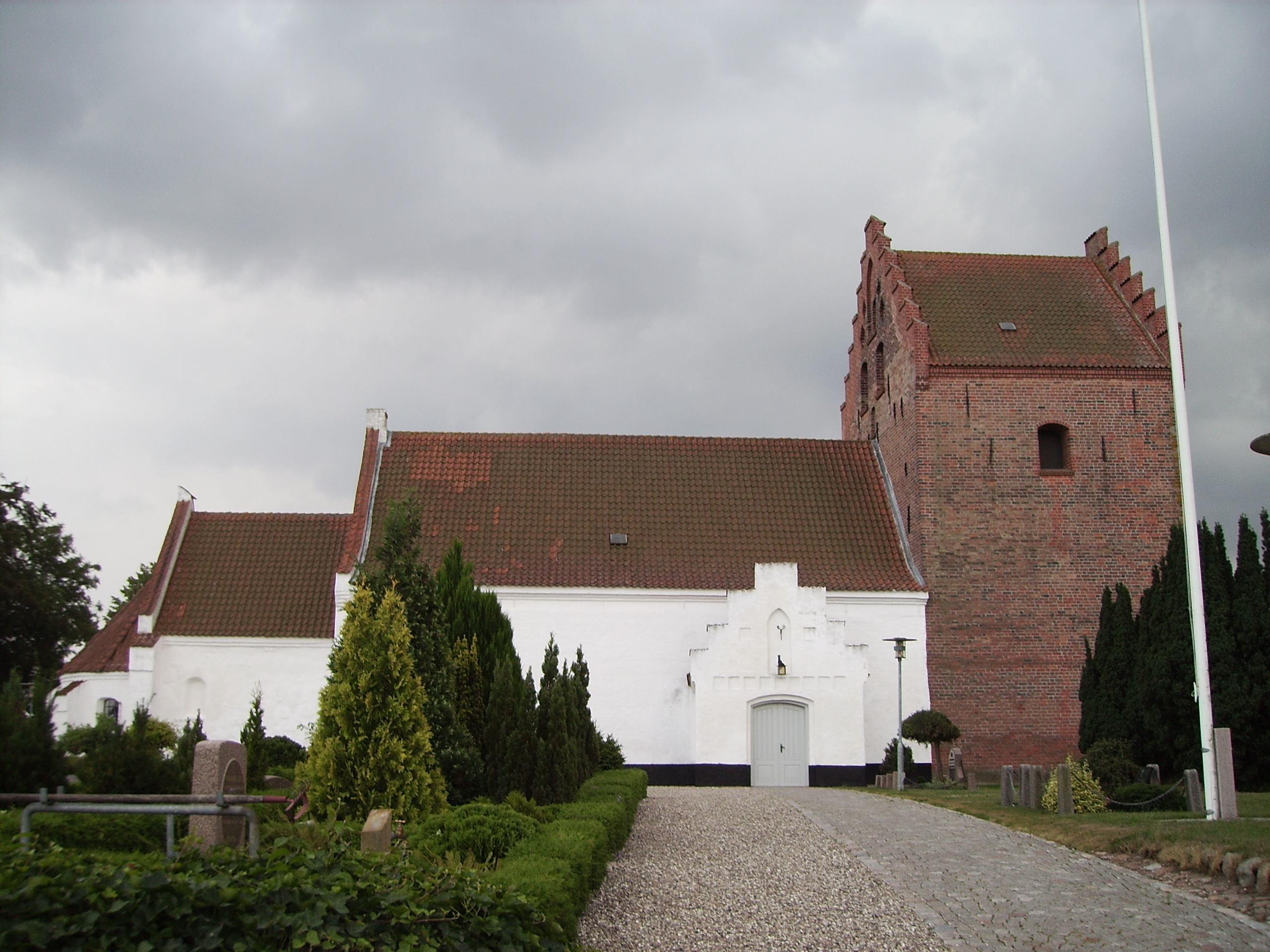 Lumby Kirke, Lumby Sogn, Lunde Herred, Odense Amt, Denmark (Danish Church) - Lumby Kirke fra nord